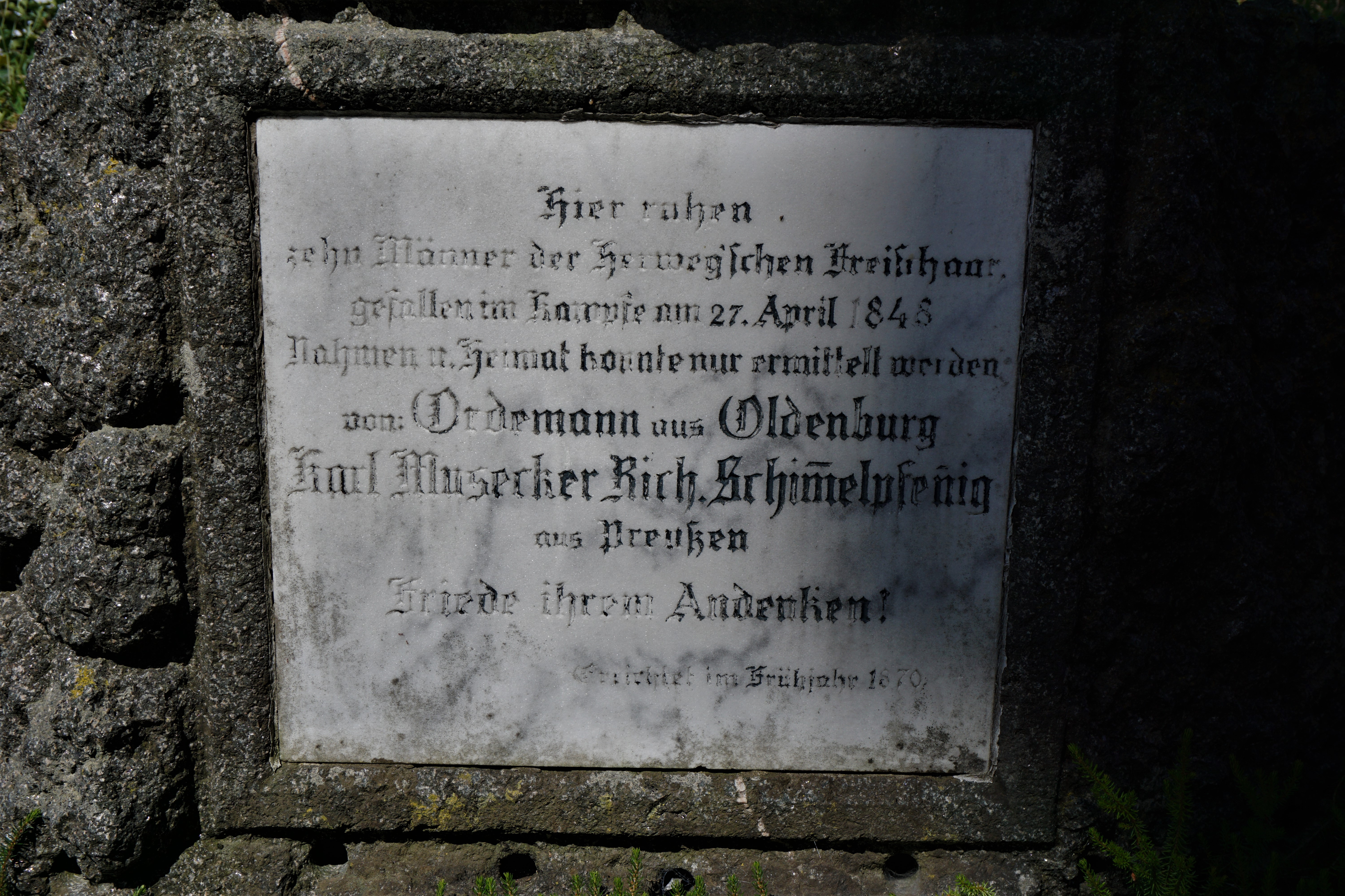 Gedenkstein für die Gefallenen vom 27. April 1848 auf dem Friedhof von Schwörstadt Dossenbach. Zum Klartext der Inschrift siehe Julius Dorneich: Der Zug der Herweghschen Legion und die Erinnerungen des badischen Regierungskommisärs Johann Nepomuk Fromherz über ihr Ende bei Dossenbach am 27. April 1848, in: Das Markgräflerland, Heft 3/4, 1973, S. 111–131 Digitalisat der UB Freiburg Digitalisat der UB Freiburg